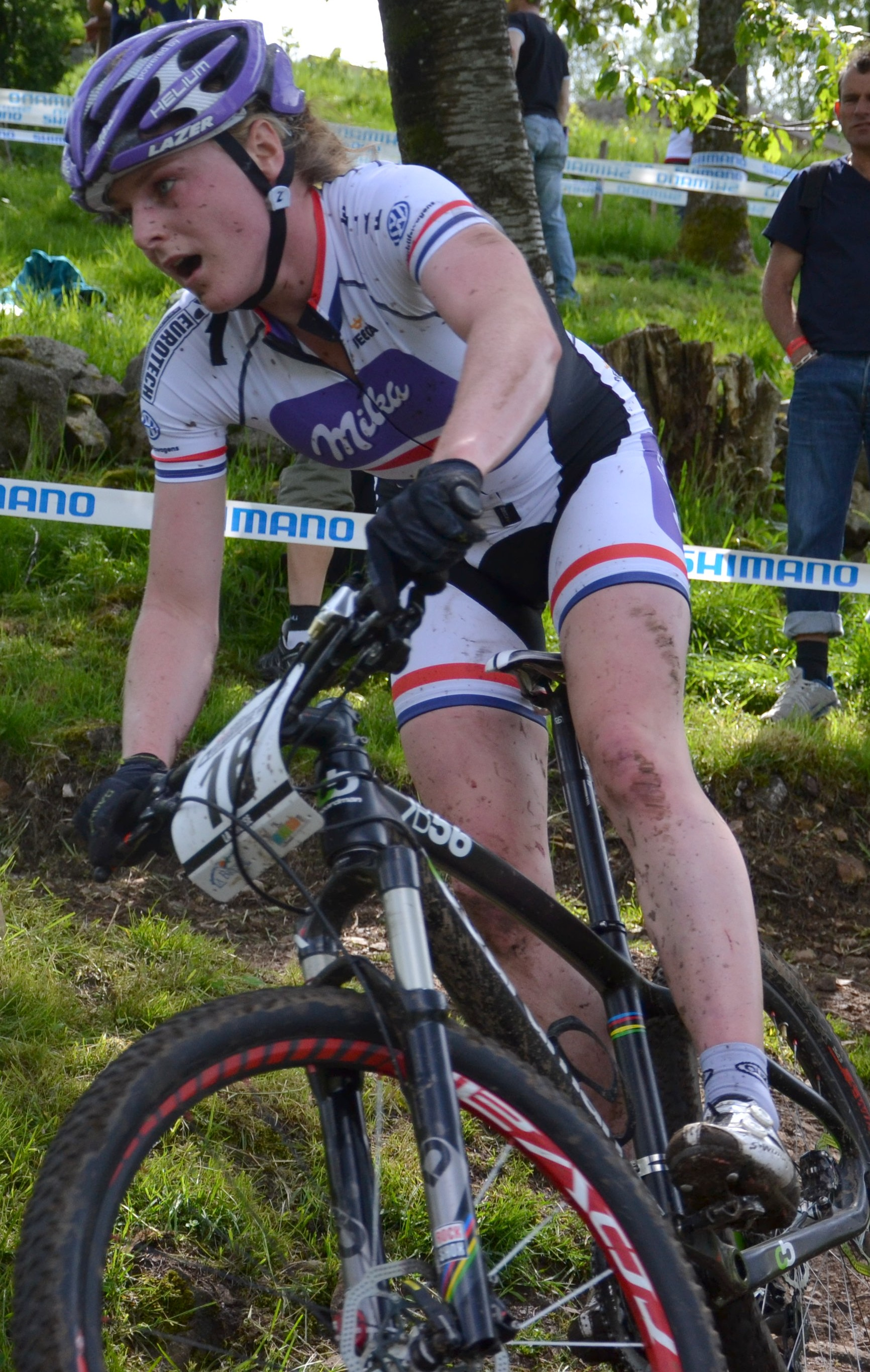 Annie Last lors de la 4e manche de la coupe du monde de VTT 2012 à La Bresse (FRA).